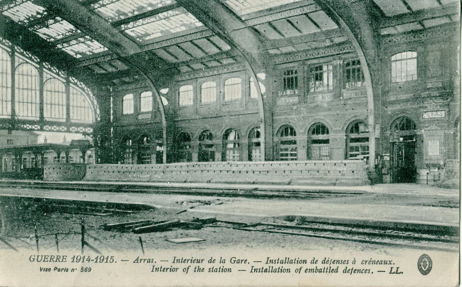 Carte postale ancienne éditée par LLGUERRE 1914-1915 : ARRAS - Intérieur de la Gare (Installation de défenses à créneaux Cette gare monumentale a été détruite en 1915